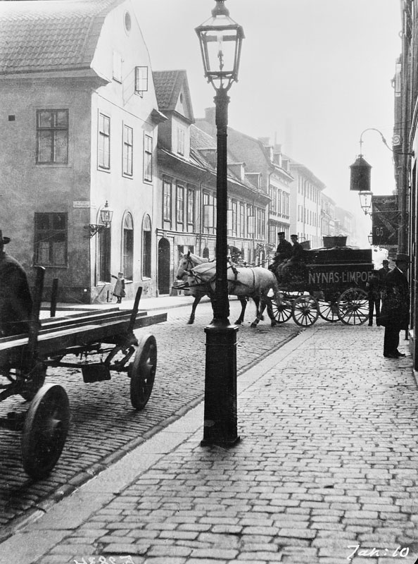 Regeringsgatan 54 A, B och C söderut från hörnet av Lästmakargatan. Hörnhuset rymde Stockholms lyceum